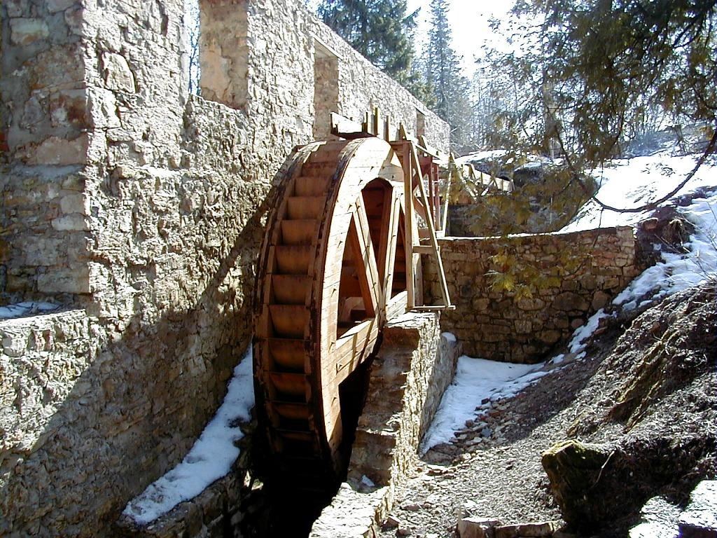 Ieriķu dzirnavu ūdensrats 2000-03-26